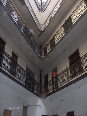 Porges Palota, Banská Bystrica